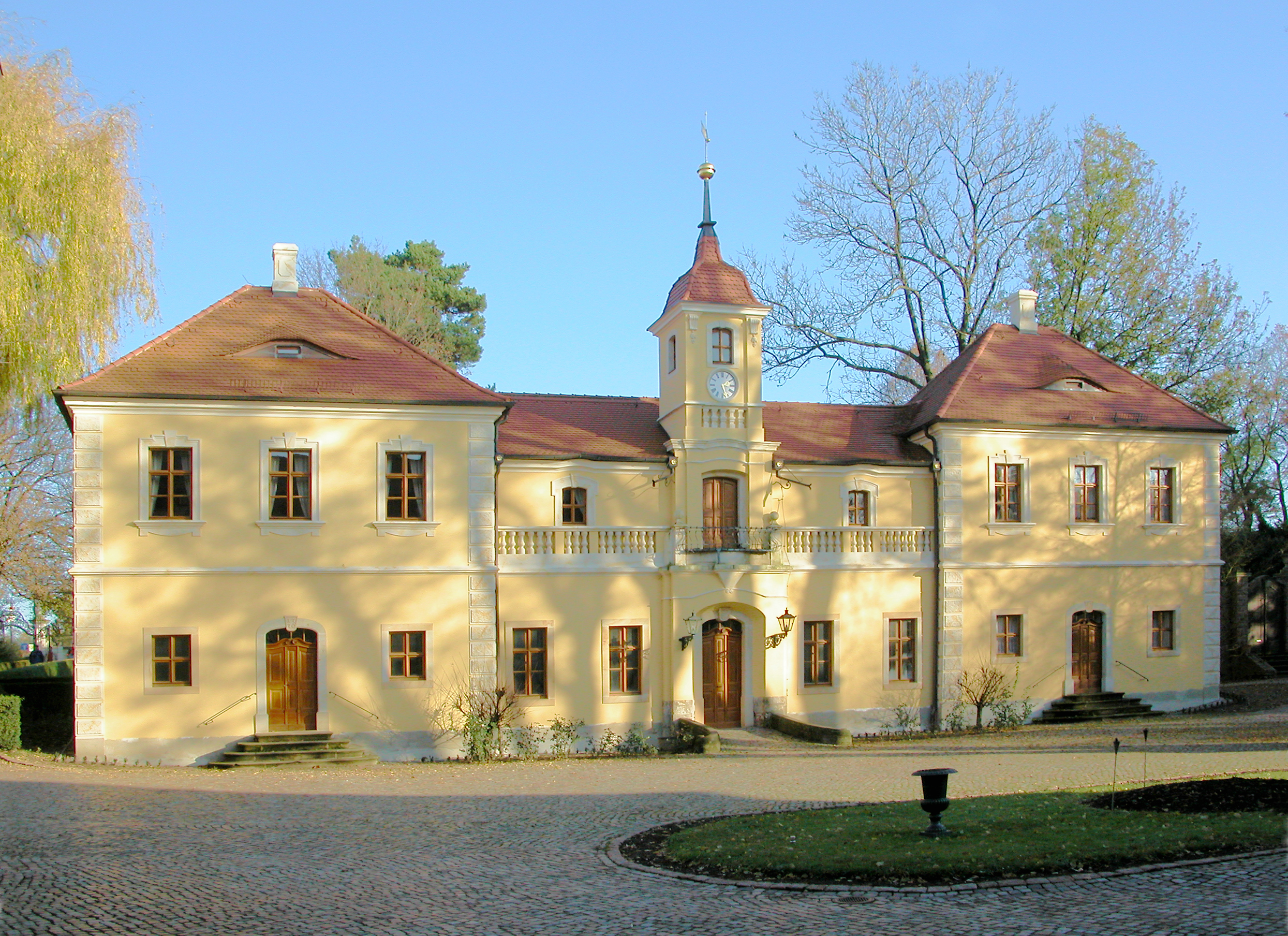 07.11.2009 01662 Proschwitz, Heiliger Grund 2 (GMP: 51.179249,13.475305): Das barocke Dienerhaus (1776) von Schloß Proschwitz. Proschwitz ist Sachsens ältestes noch existierendes Weingut. Ursprünglich gehörten die Proschwitzer Weinberge dem Meißner Bischof. Ab 1997 Weingut von Dr. Georg Prinz zur Lippe. [DSCN40102.TIF]20091107200DR.JPG(c)Blobelt